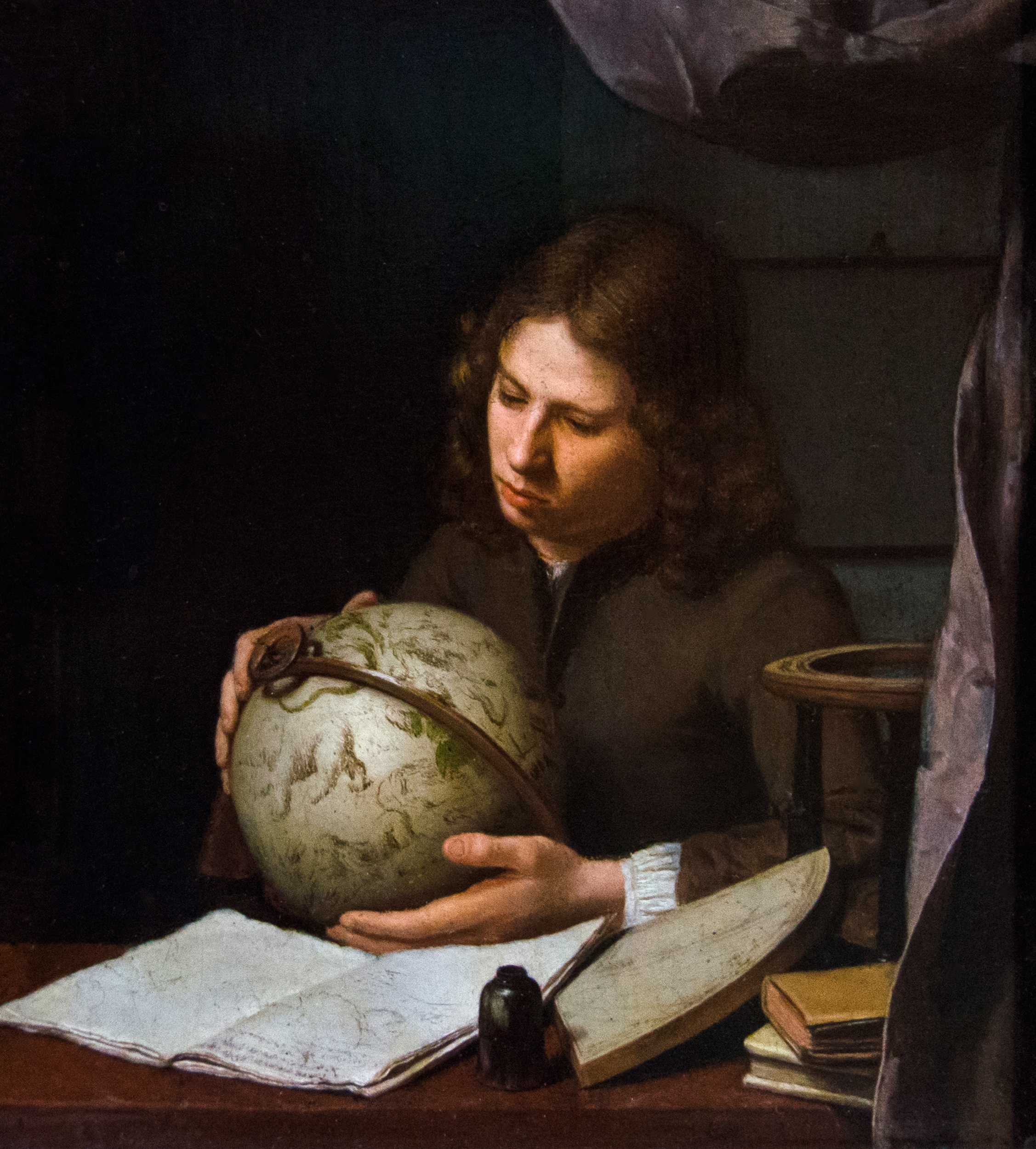 Un joven astrónomo sostiene un globo celeste, donde se pueden apreciar las constelaciones representadas con figuras de animales. Las constelaciones que se ven corresponden al hemisferio norte, entre otras la de la Osa Mayor. También se puede apreciar un cuadrante en el primer plano. El cuadro esta enmarcado con el dibujo de un lienzo que le da a la pintura una sensación de tridimensionalidad. Se calcula por referencia a otro cuadro similar del mismo autor, que el cuadro fue realizado en 1685.